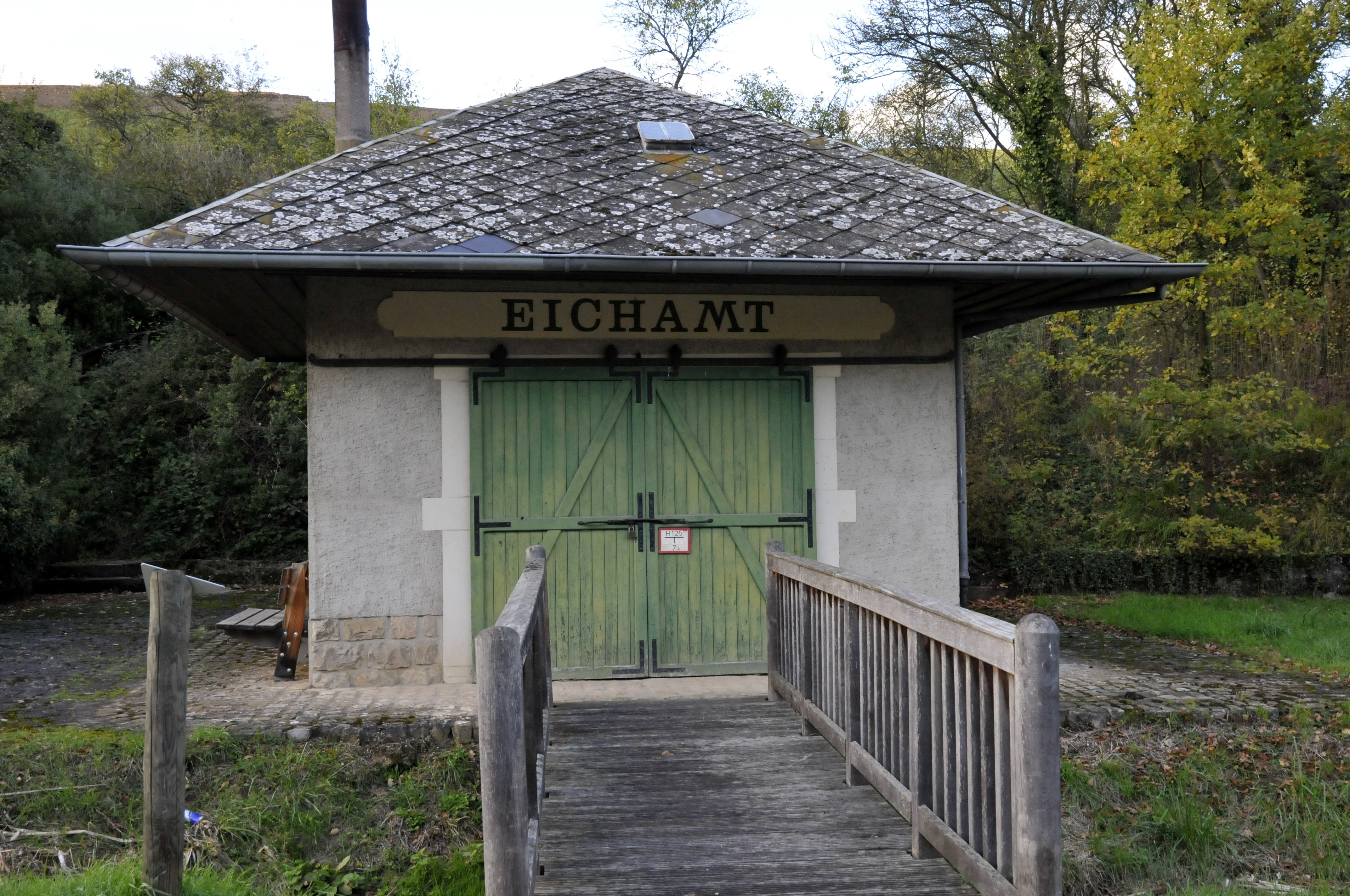 Dat fréiert Eichamt zu Rëmerschen Auteur: Jwh Source: eegent Wierk